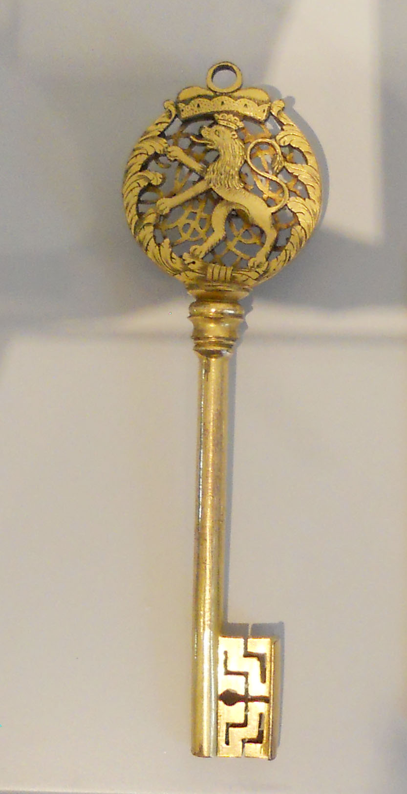 Kammerherrenschlüssel, 18. Jahrhundert, des Bernhard Heinrich von Germeten, wird aufbewahrt im Haus Hövener in Brilon